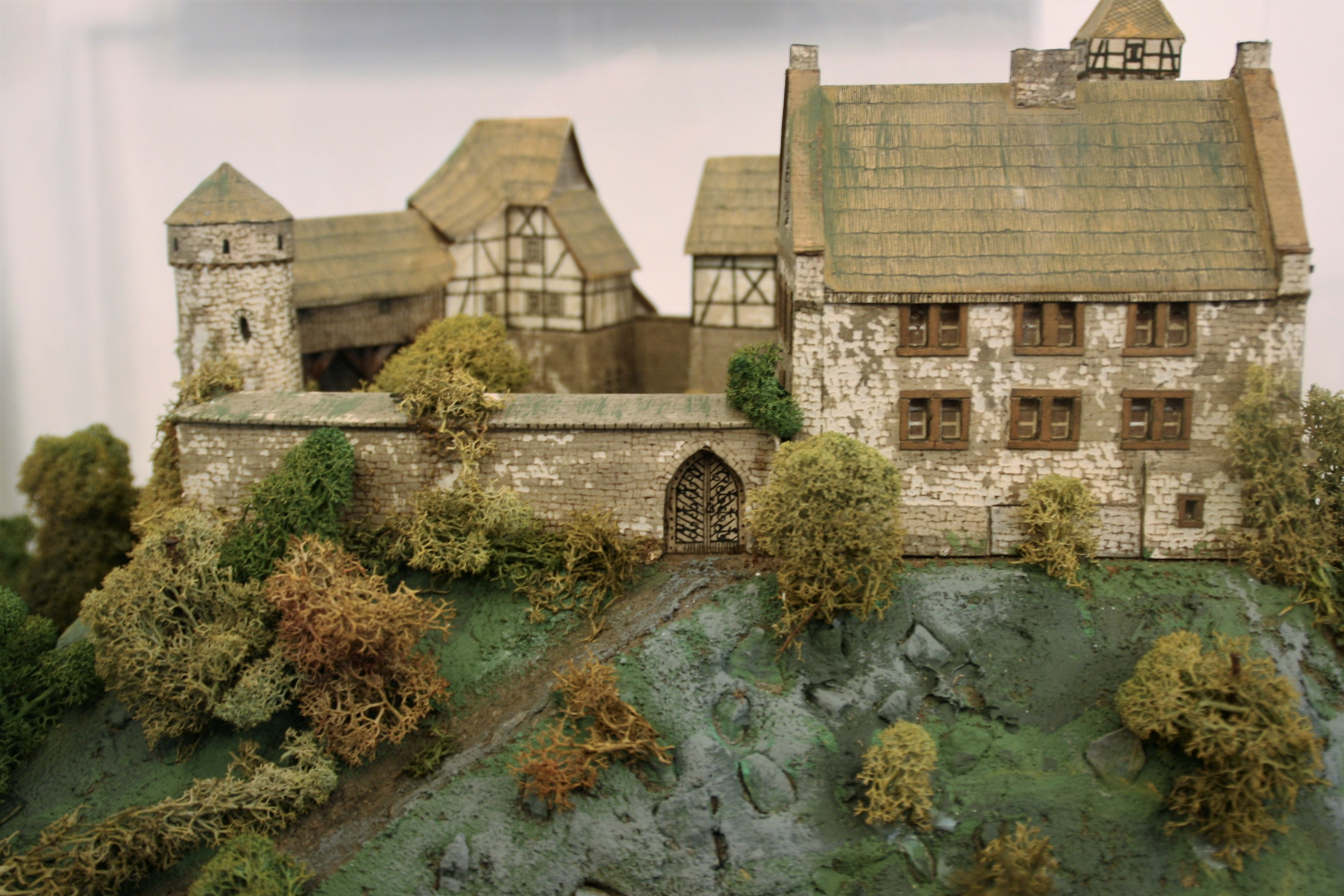 Das Burgmodell der Vorstenburg im Fresekenhof